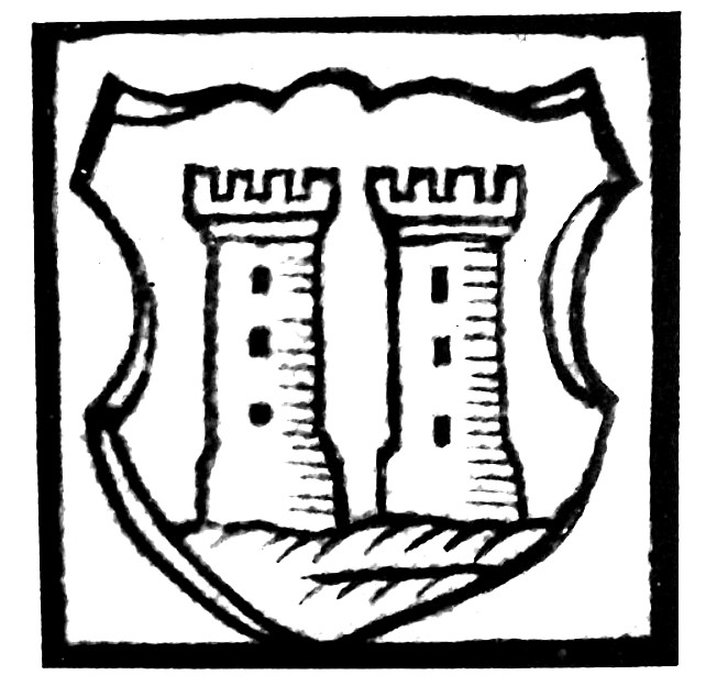 Herb rodu von Welczek z Dębińska Wielkiego.